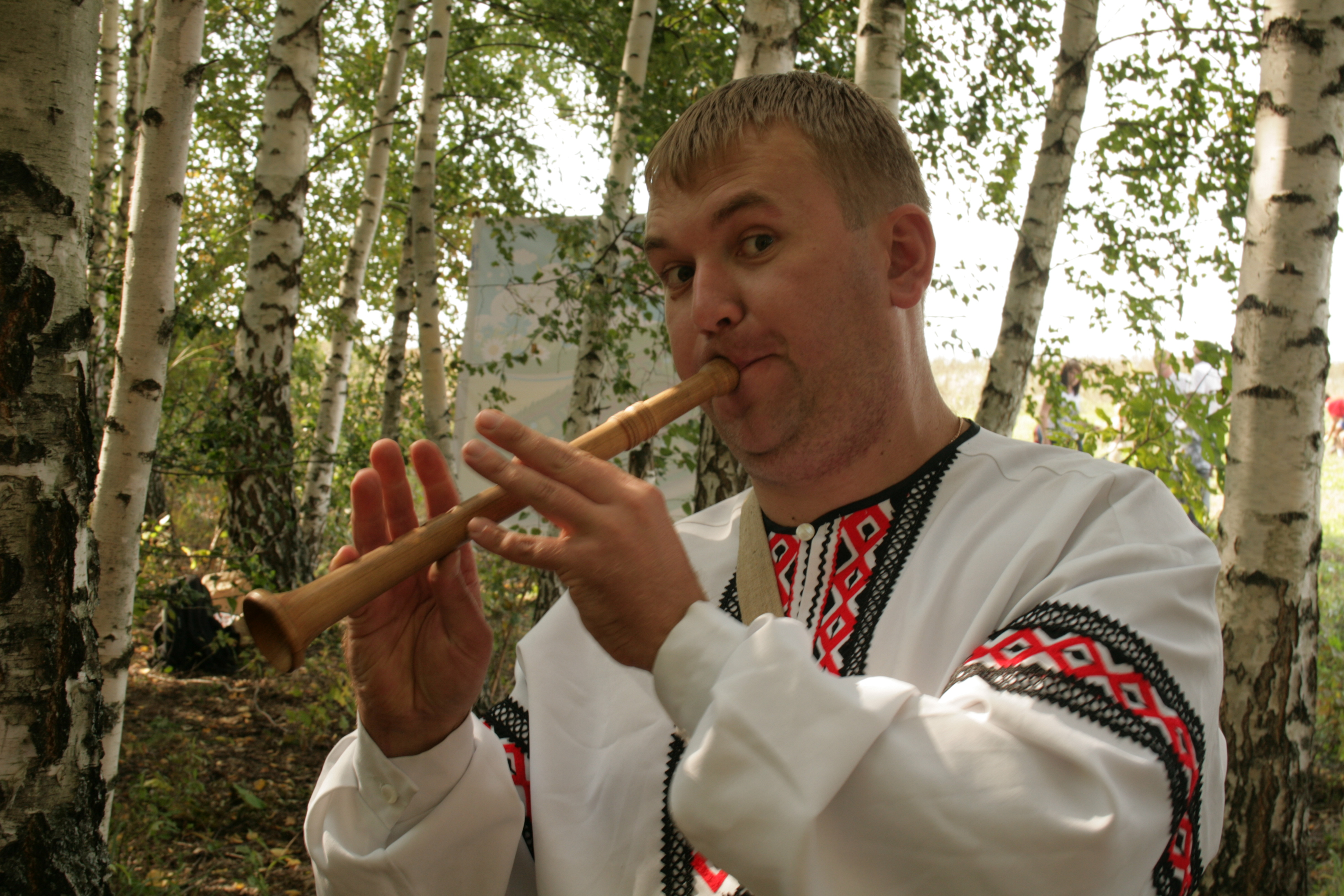 Рожок. Евгений Гуторов. Открытие нового микрорайона родового экокопоселения «Кореньские родники». 15 сентября 2012 г. Белгородская область, Шебекинский район.